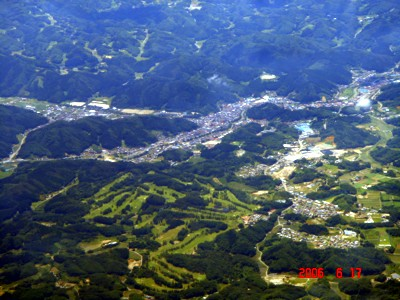 Ishikawa-cho, Fukushima Prefecture